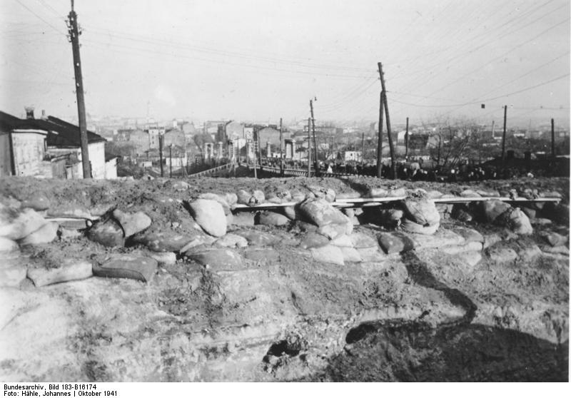 An der Sowjetfront: Blick auf Charkow von einer verlassenen Sandsackstellung der Sowjets aus. PK-Aufnahme: Kriegsberichter: Hähle 10224-41 "Fr.f.D." "Fr.OKW" Okt.41 Information added by Wikimedia users. : русский: Советские оборонительные укрепления перед стратегическим Свердловским виадуком на Холодной горе, октябрь 1941